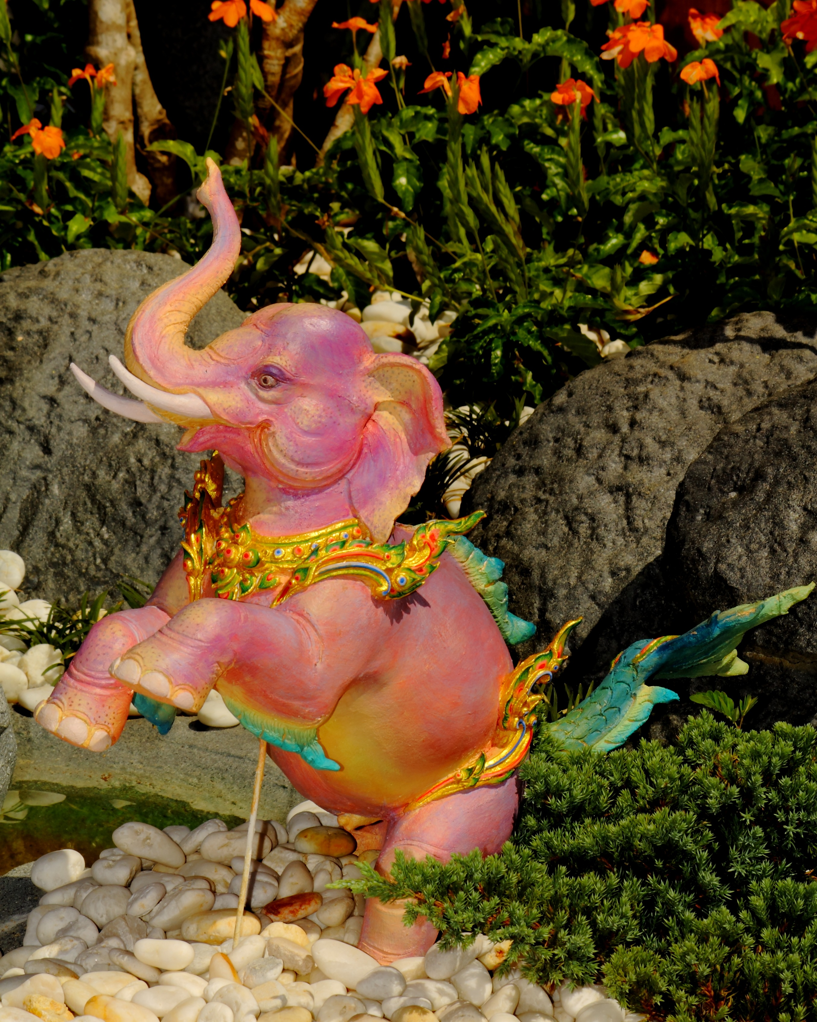 "วารีกุญชร" ตัวเป็นช้าง มีครีบและหางปลา พระเมรุและเครื่องประกอบพระเมรุในพระราชพิธีพระราชทานเพลิงพระศพสมเด็จพระเจ้าภคินีเธอ เจ้าฟ้าเพชรรัตนราชสุดา สิริโสภาพัณณวดี ณ พระเมรุ ท้องสนามหลวง วันจันทร์ ที่ ๙ เมษายน พุทธศักราช ๒๕๕๕